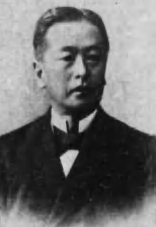 岸本辰雄（1851-1912）